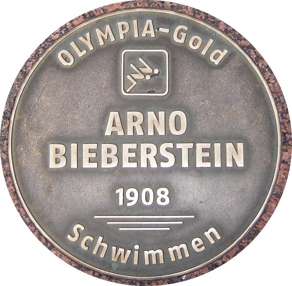 Walk-of-Fame-Plakette für Arno Bieberstein auf dem Breiten Weg in Magdeburg